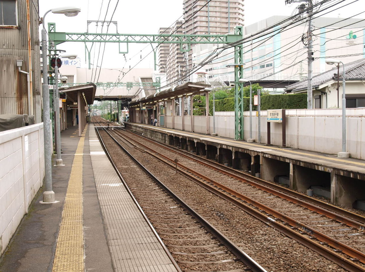 京急新子安駅プラットホーム